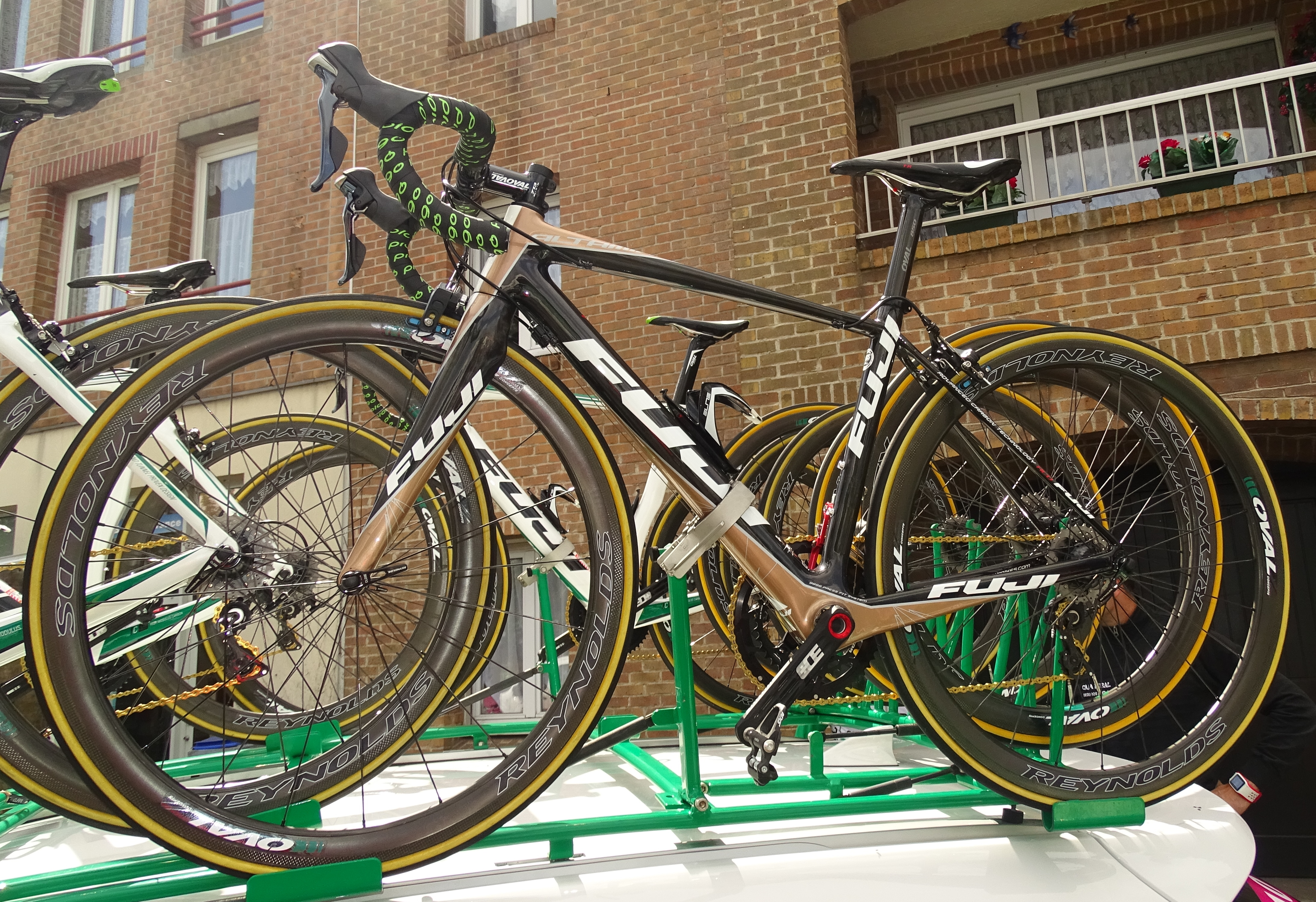 Reportage réalisé le dimanche 10 mai 2015 à l'occasion du départ de la quatrième étape des Quatre jours de Dunkerque 2015 à Cappelle-la-Grande, Nord, Nord-Pas-de-Calais, France.